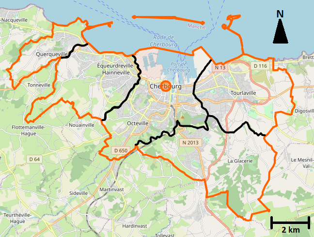 Carte de la nouvelle commune de Cherbourg-en-Cotentin (frontière orange) et ses communes associées (frontières noires).